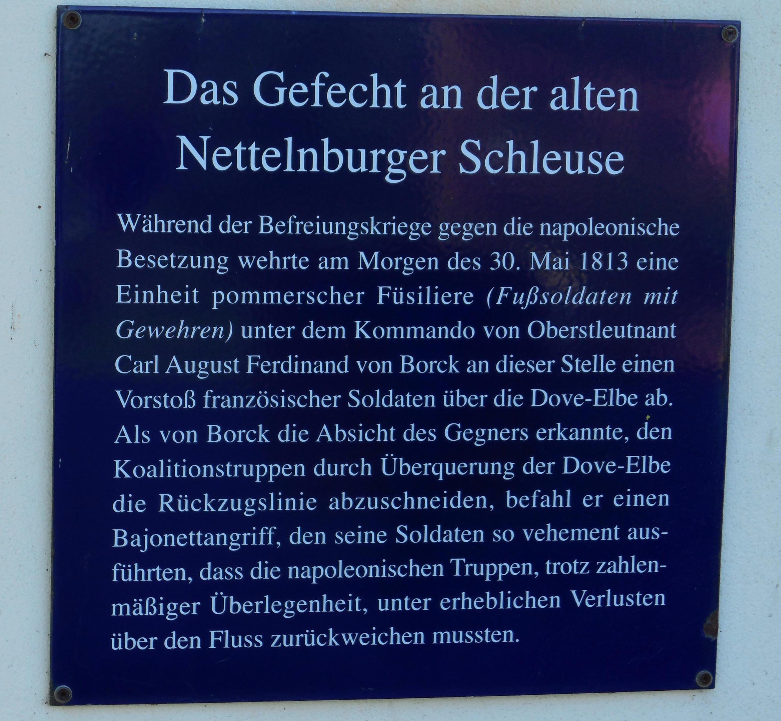 Gedenktafel am Haus Kurfürstendeich 41, Hamburg-Nettelnburg